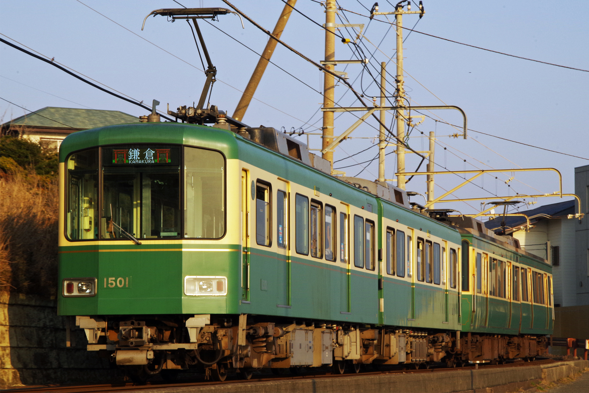 大規模更新を受けた1501編成。